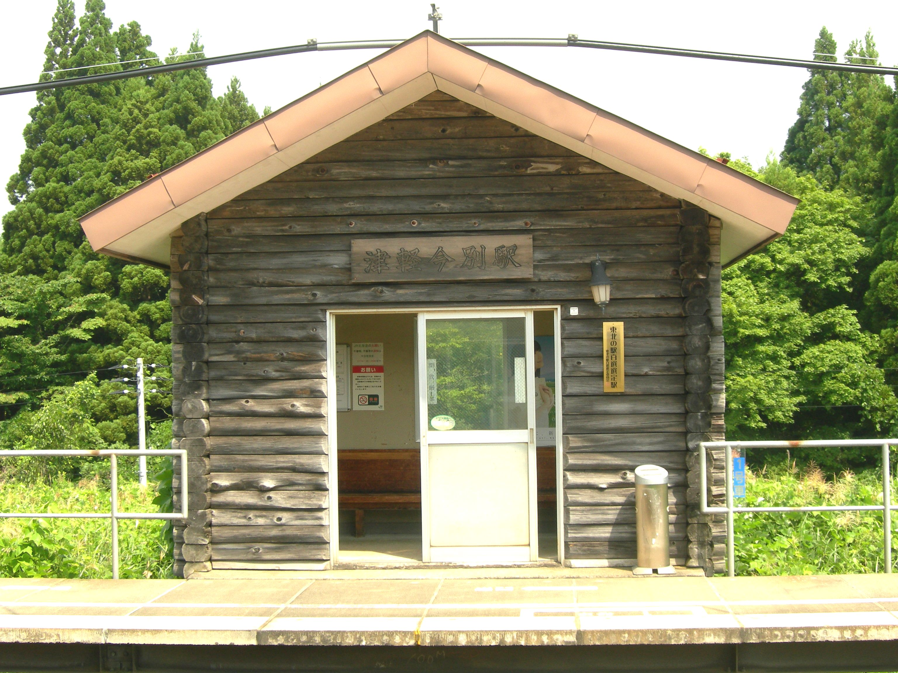 津軽今別駅2番線ホーム待合室